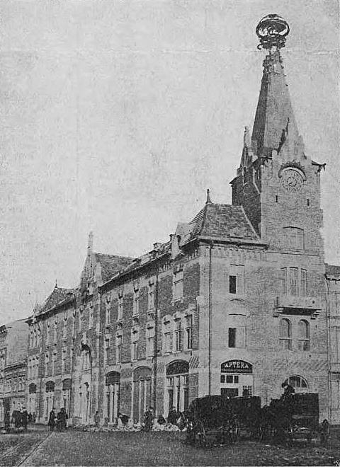 Nowy gmach Izby Handlowo-Przemysłowej w Krakowie (1905)